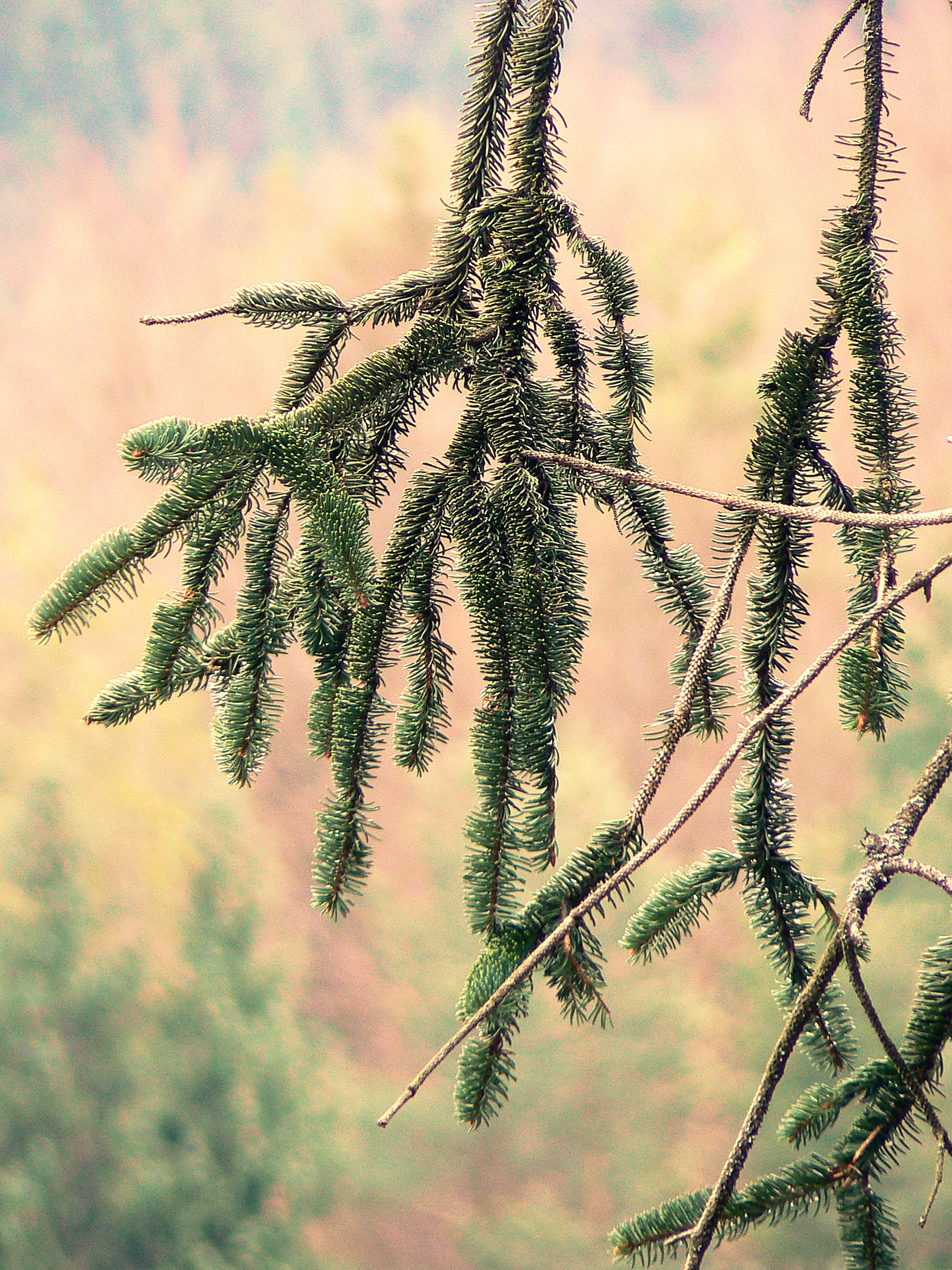 Kačja smreka